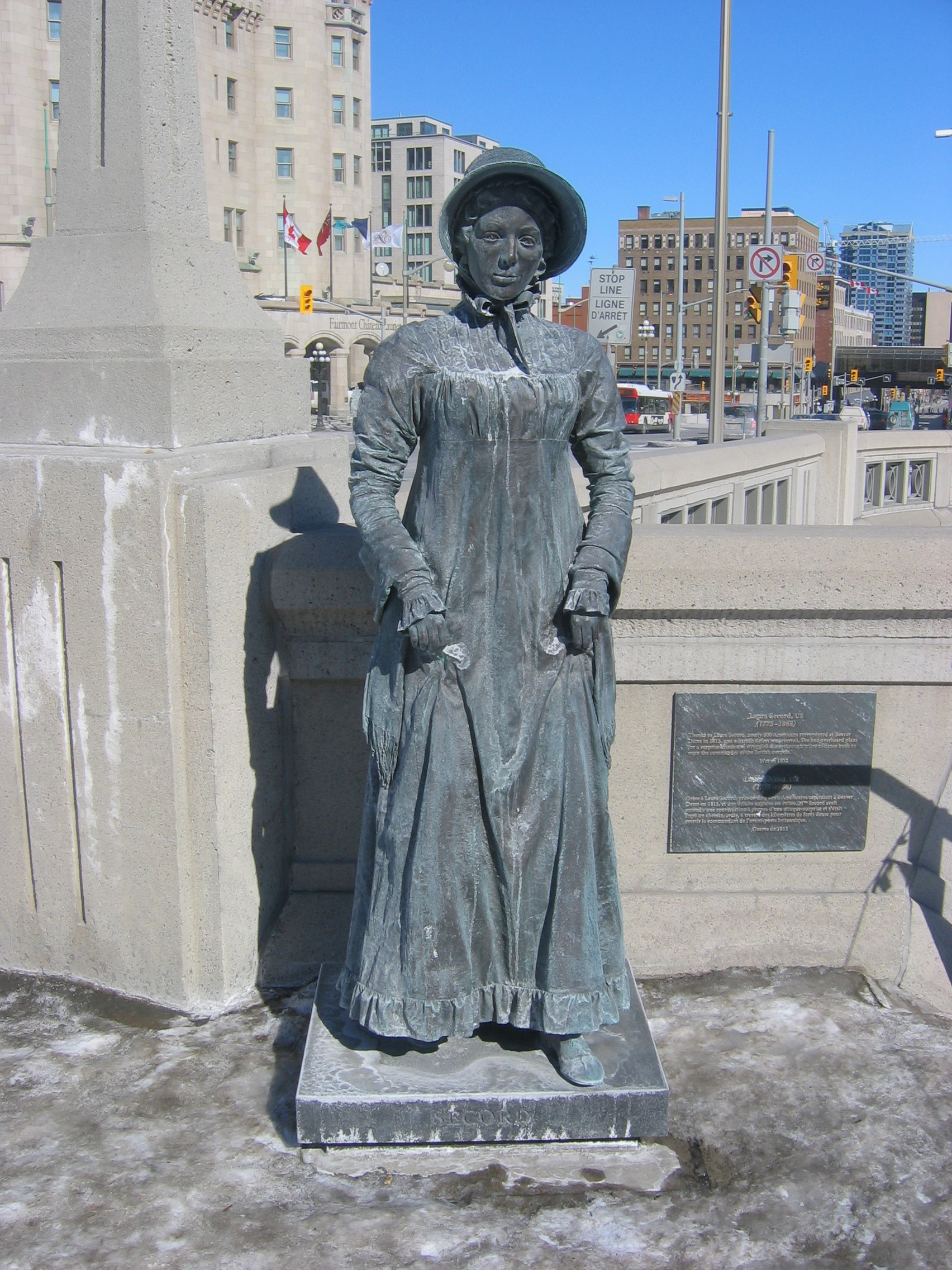 Laura Secord statue, Valiants Memorial, Ottawa